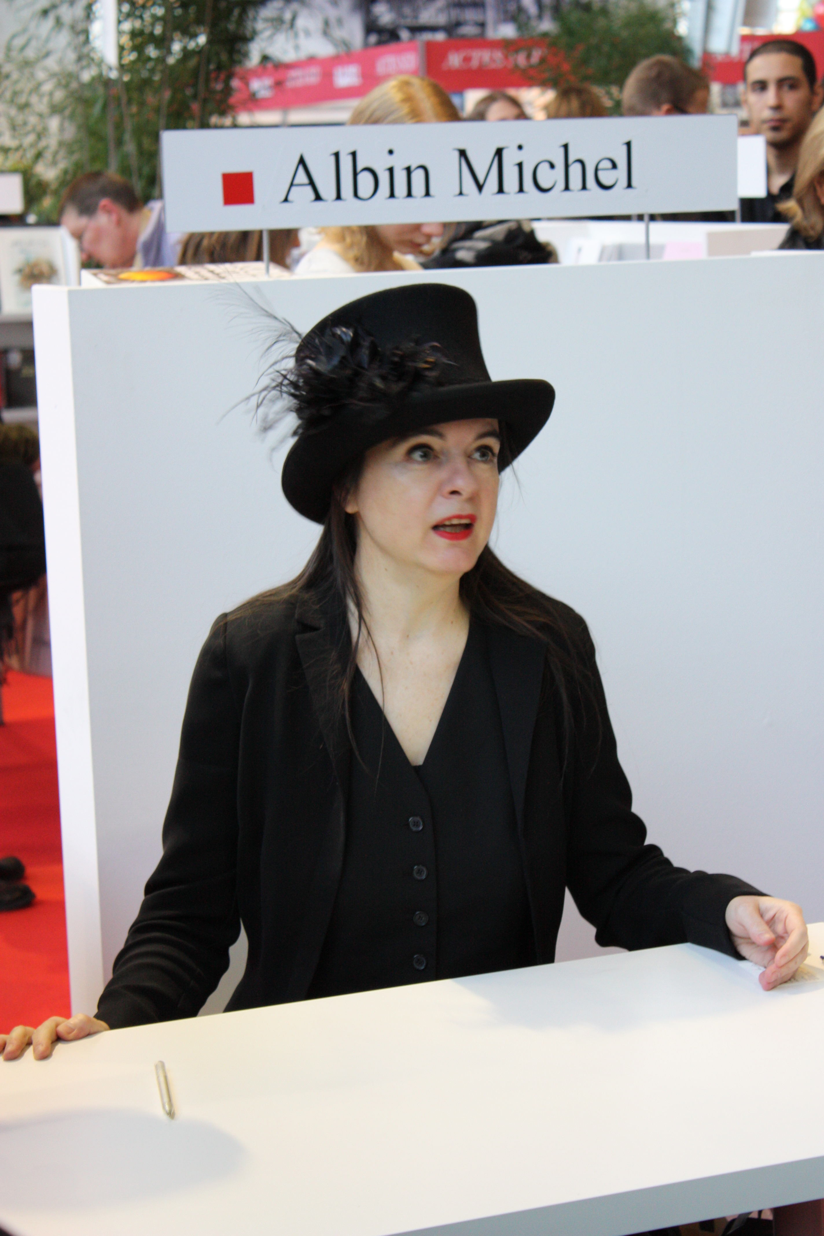 Amélie Nothomb durant une séance de dédicace lors de l'édition 2010 de la Foire du Livre de Bruxelles.